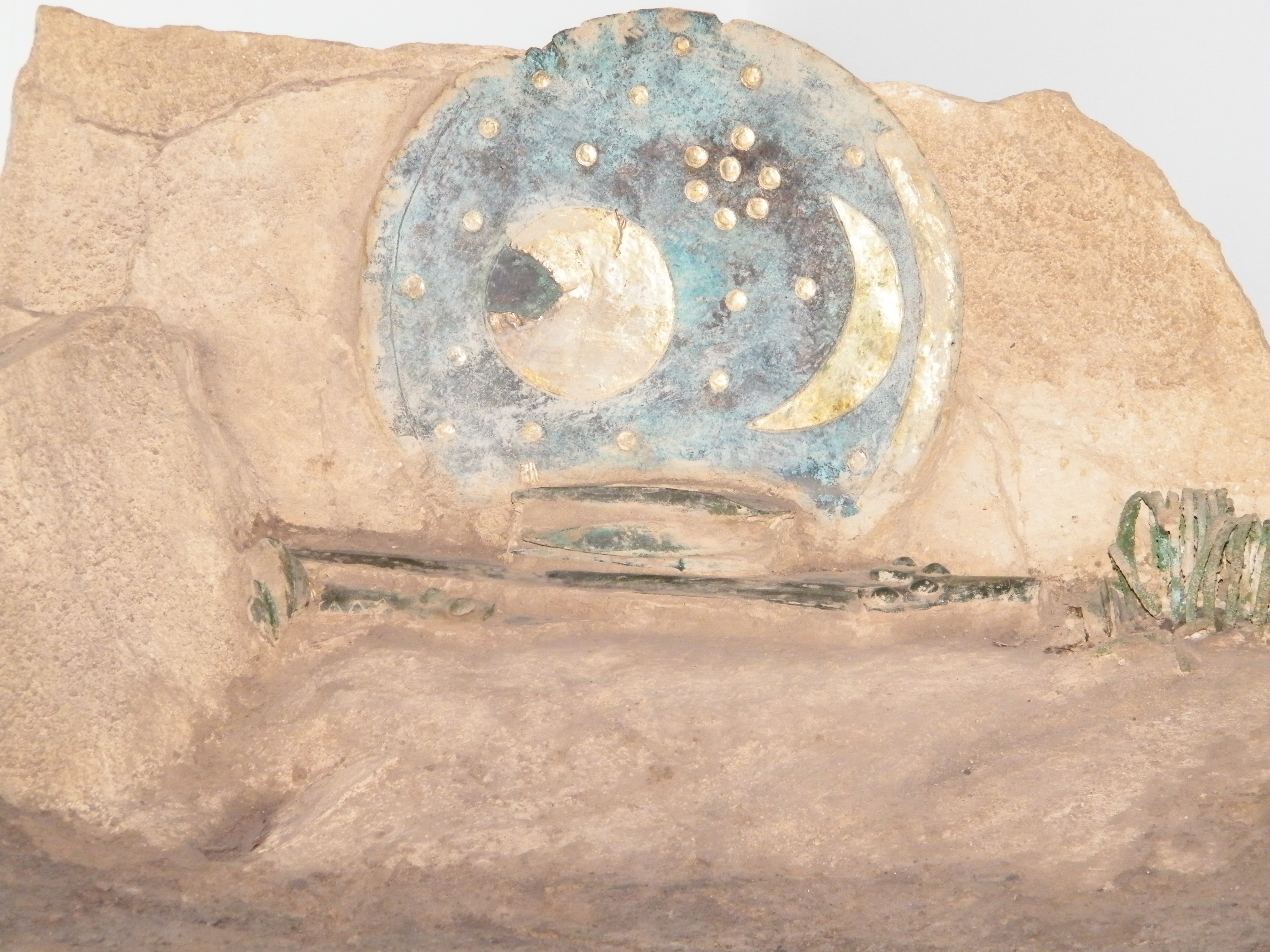 Modell der Himmelscheibe von Nebra im Sand in einer Ausstellung in Frankfurt (Oder), Deutschland, 2010